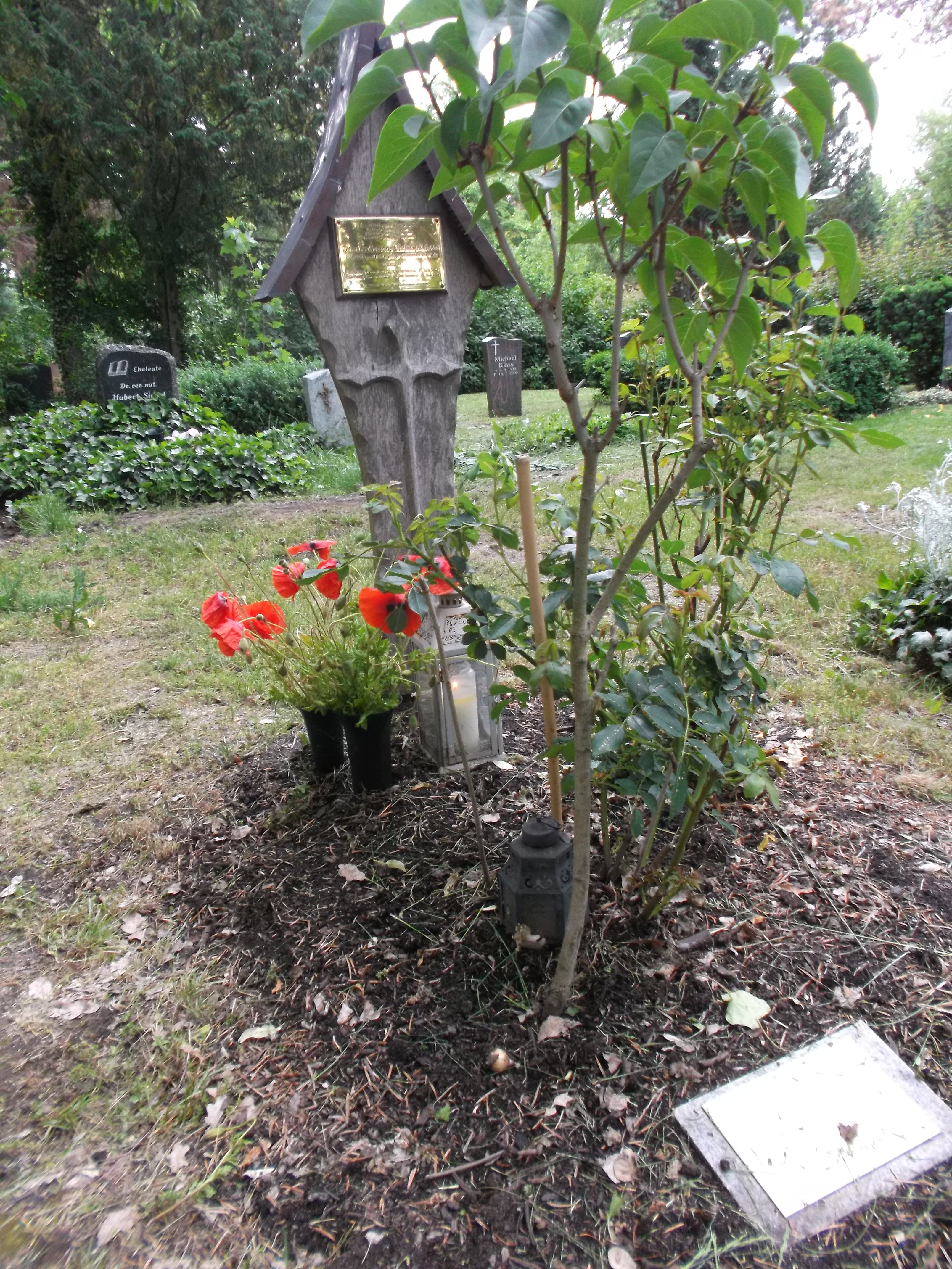 eigenes Foto